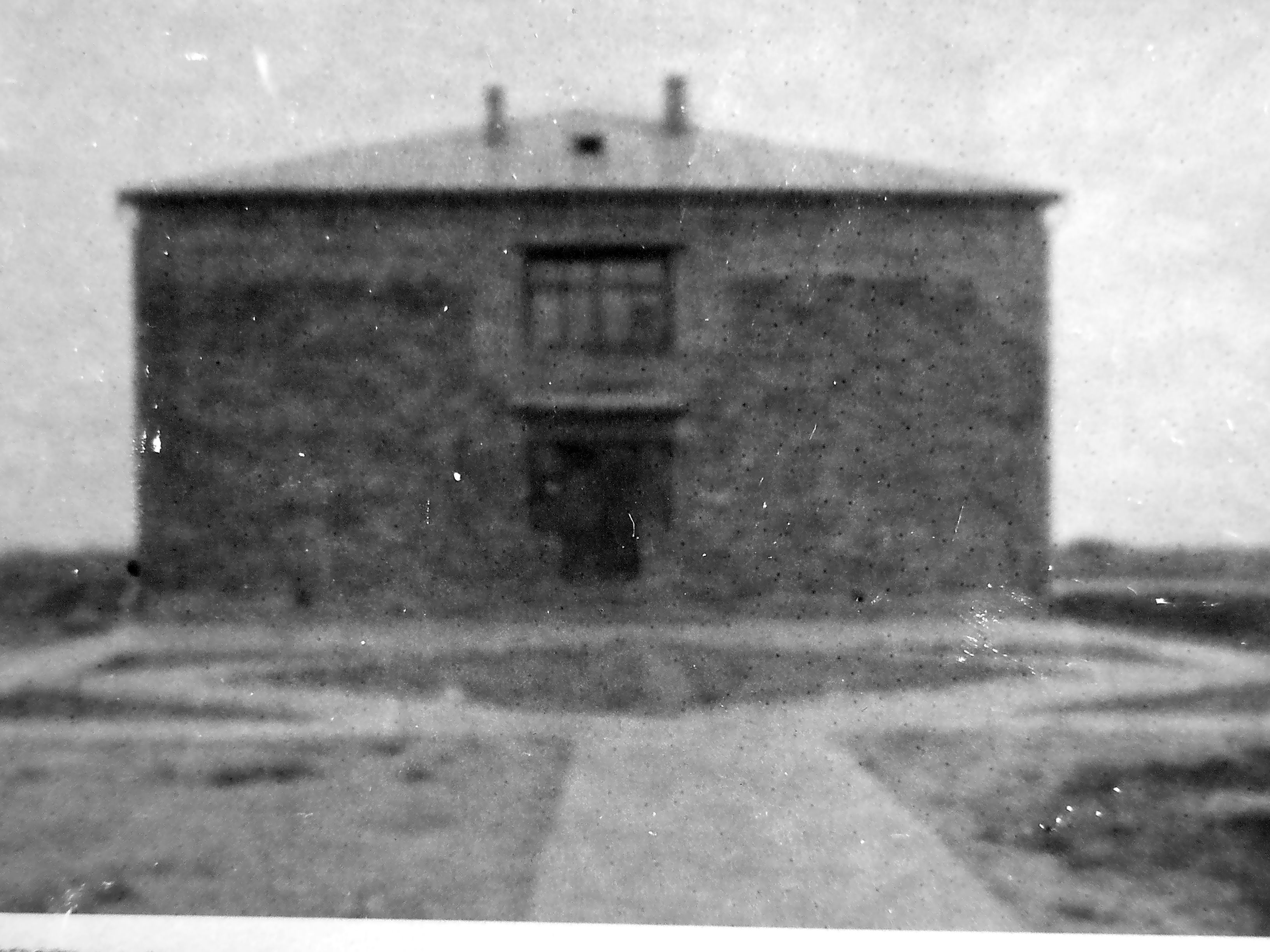 Tak wyglądał budynek szkoły w Wólce Konopnej w latach pięćdziesiątych ubiegłego wieku.